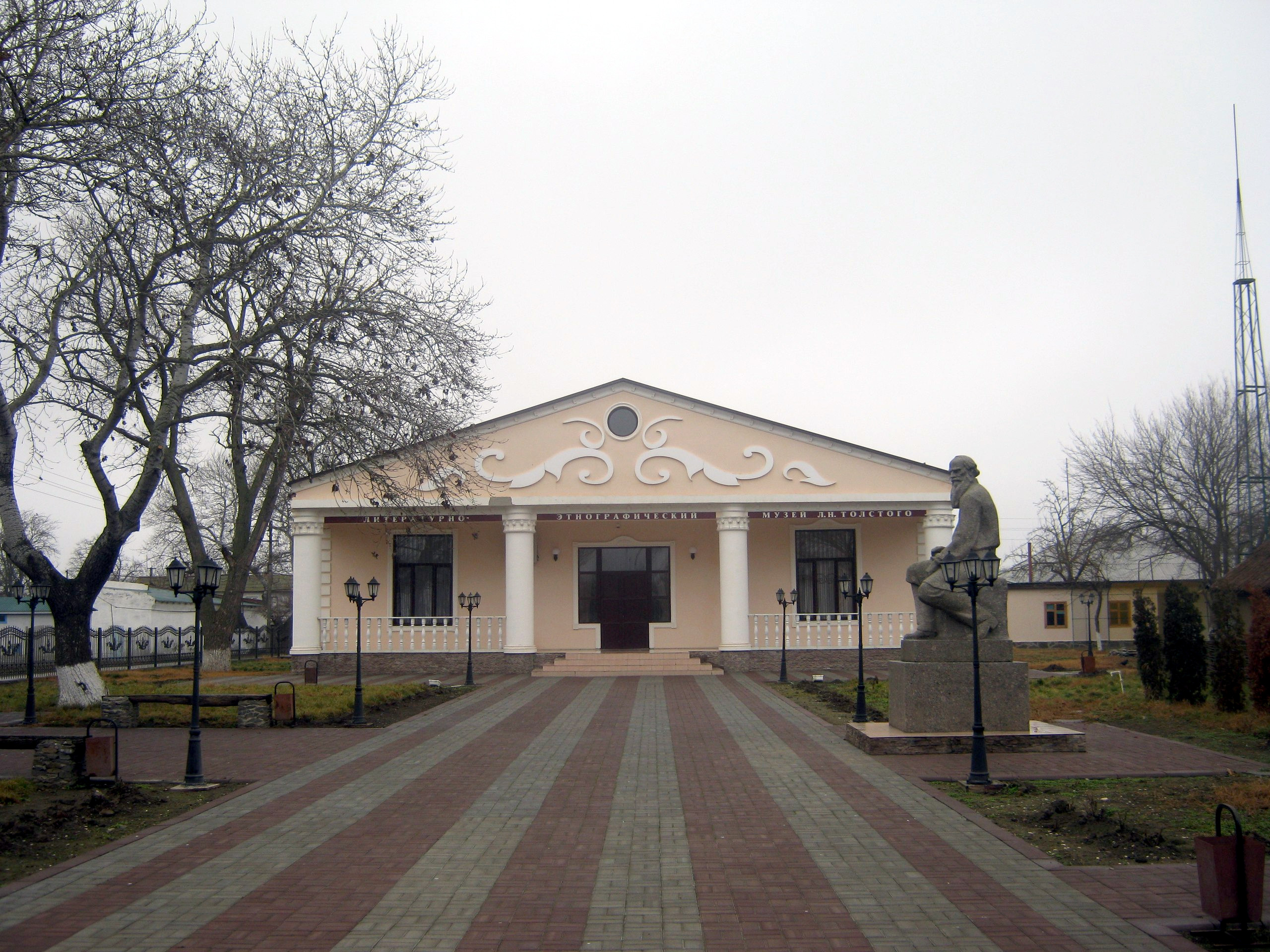 Чечня, ст. Старогладовская